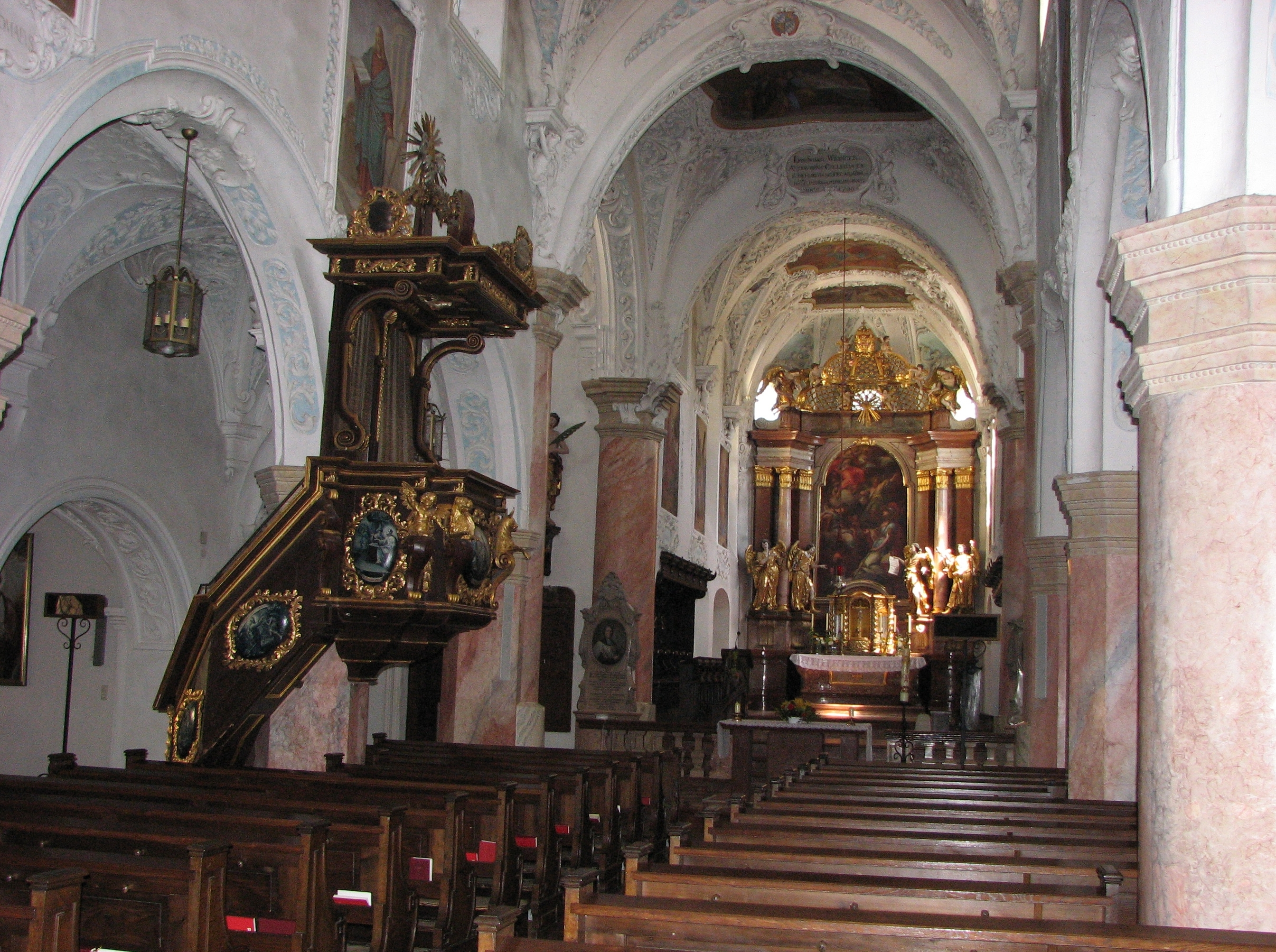 Description